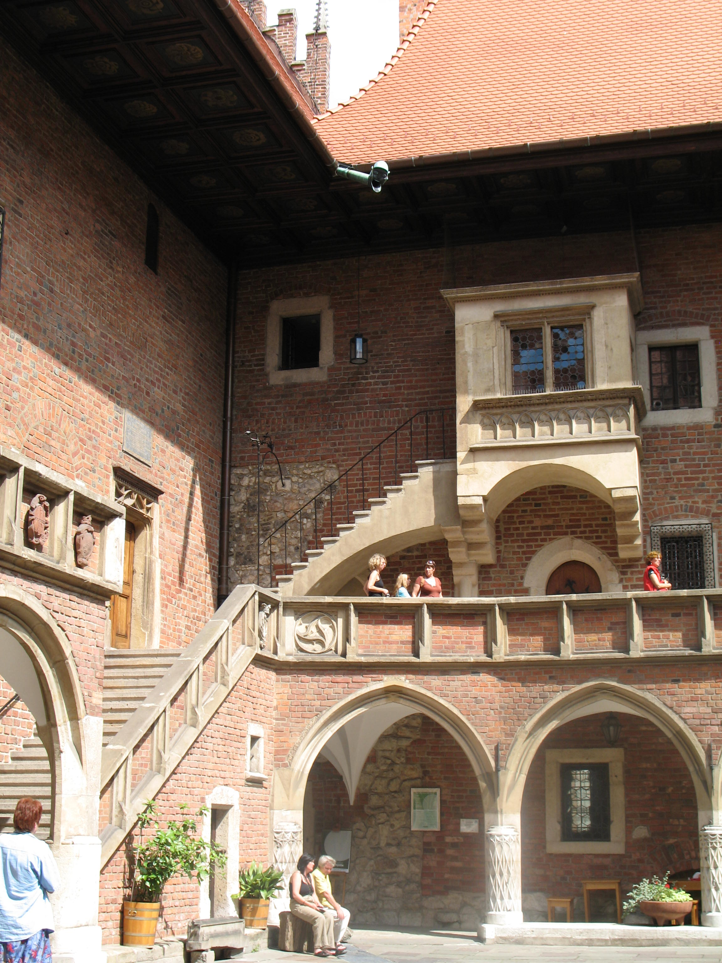 CM in Kraków, Poland